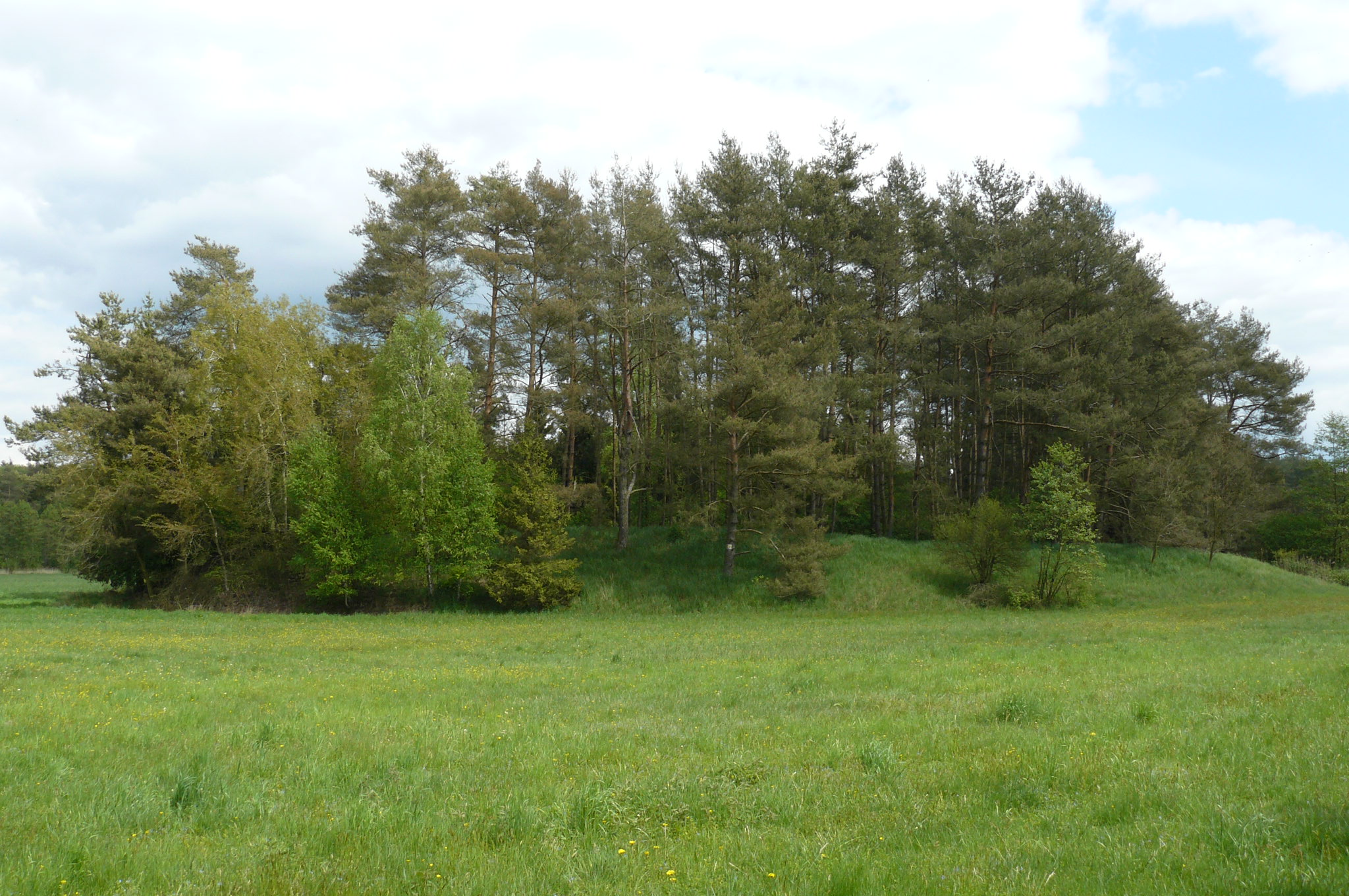 Grodzisko Sulimira w gm. Zduny.